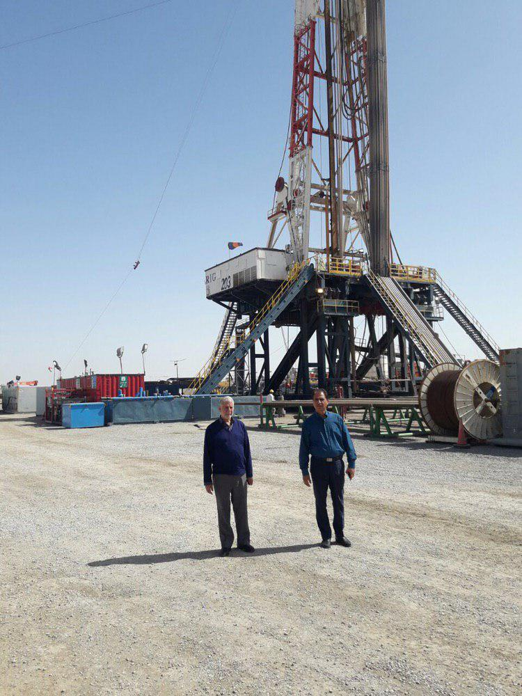 اولین چاه آب ژرف کشور